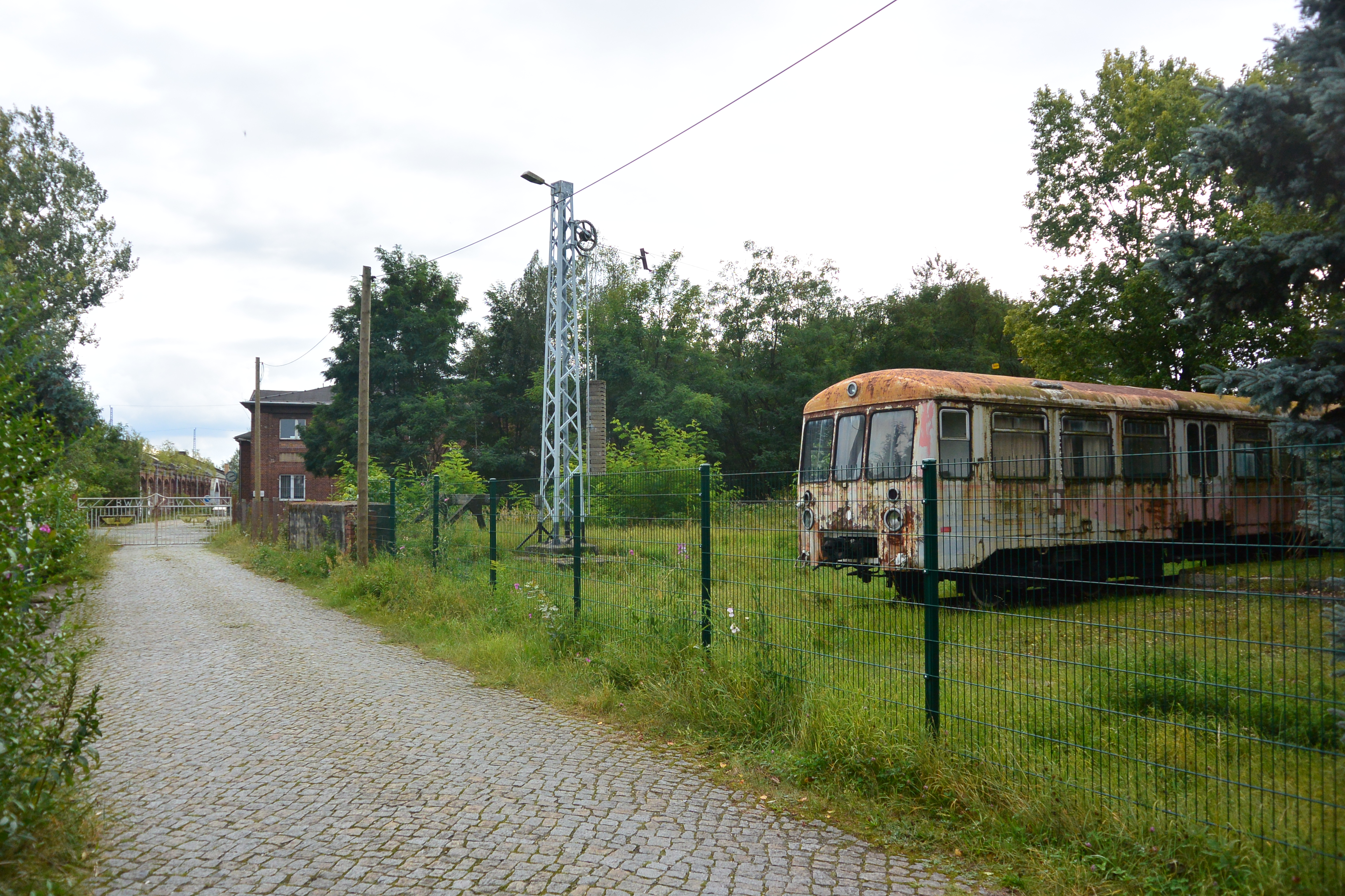 denkmalgeschützter Leichttriebwagen VT 4.12.01, abgestellt im ehemaligen Betriebswerk Hoyerswerda